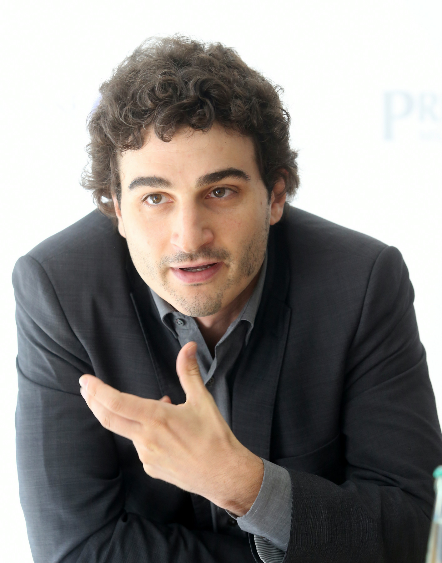 Ateş Gürpinar, deutscher Politker (DIE LINKE). Er ist von Beruf Medienwissenschaftler, und bayerischer Landessprecher und Münchner Kreissprecher der Partei DIE LINKE. Er führt die bayerischen Linken in die Landtagswahl 2018. Hier am 7. August 2017 während einer Veranstaltung im Münchner PresseClub. Titel des Werks: "Ateş Gürpinar, DIE LINKE, im Münchner PresseClub (2017)"